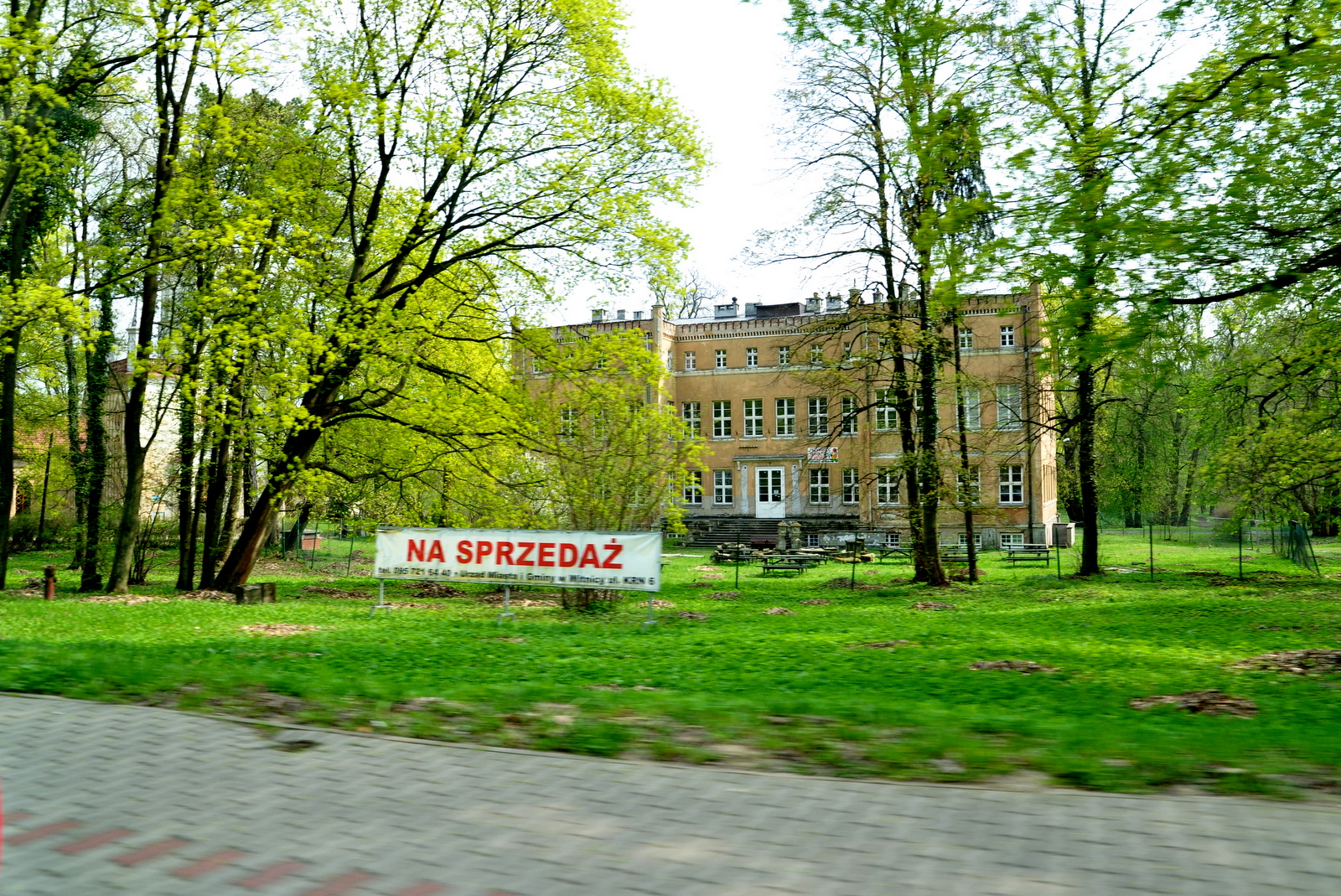 Der Palast zum Verkauf ( 2011 )